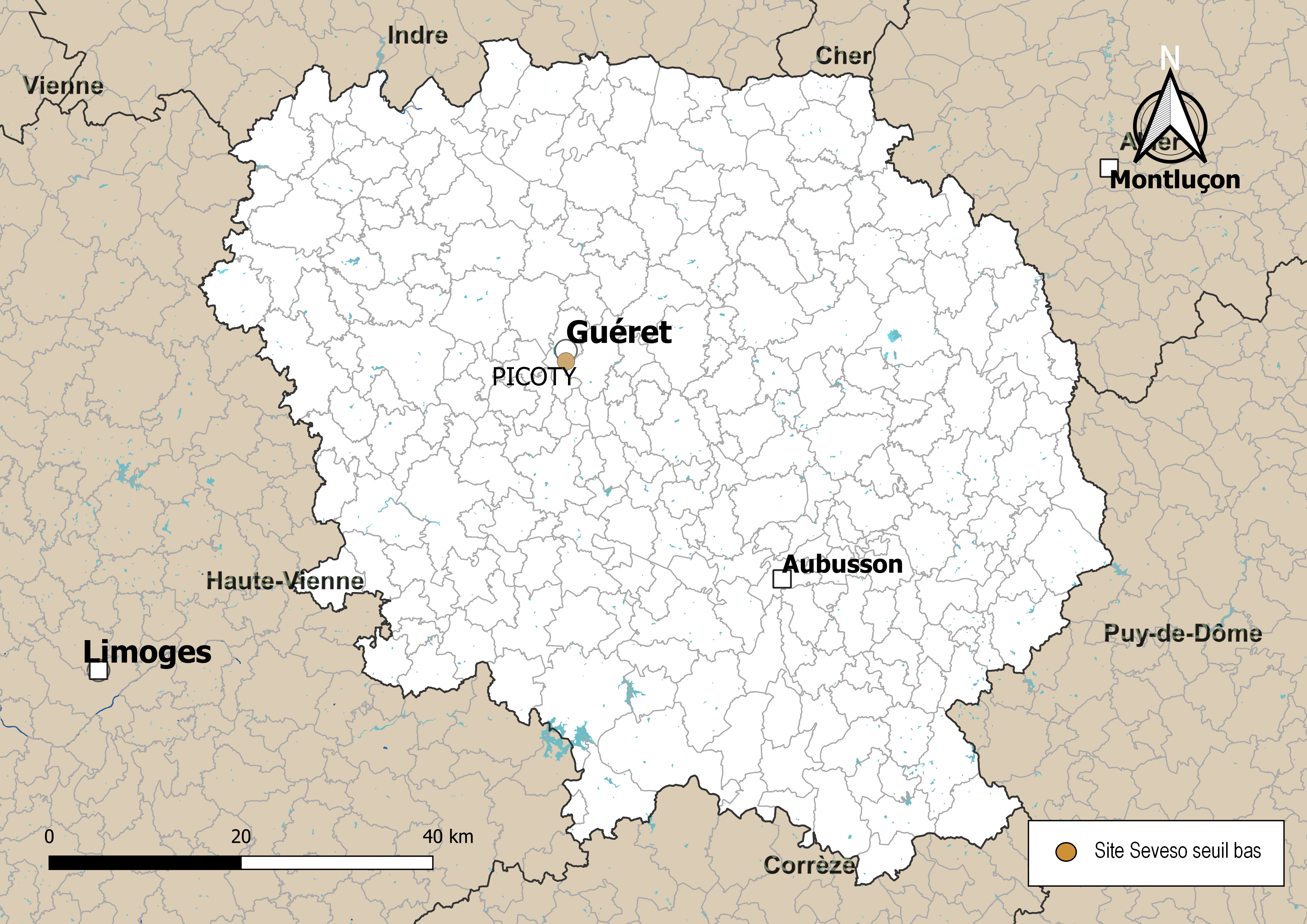 Carte de localisation des sites Seveso seuil bas dans le département de la Creuse (Nouvelle-Aquitaine, France). Carte arrêtée au 3 novembre 2019.